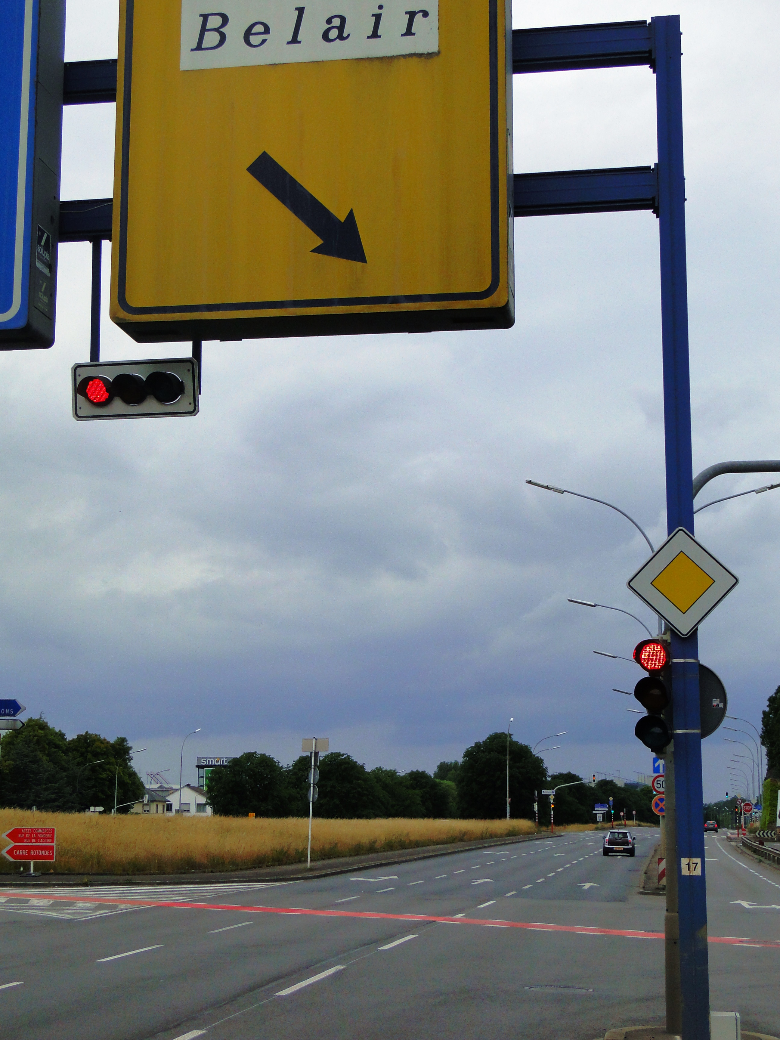 Verkéiersluucht Lëtzebuerg - horizontal a vertikal Luucht rout